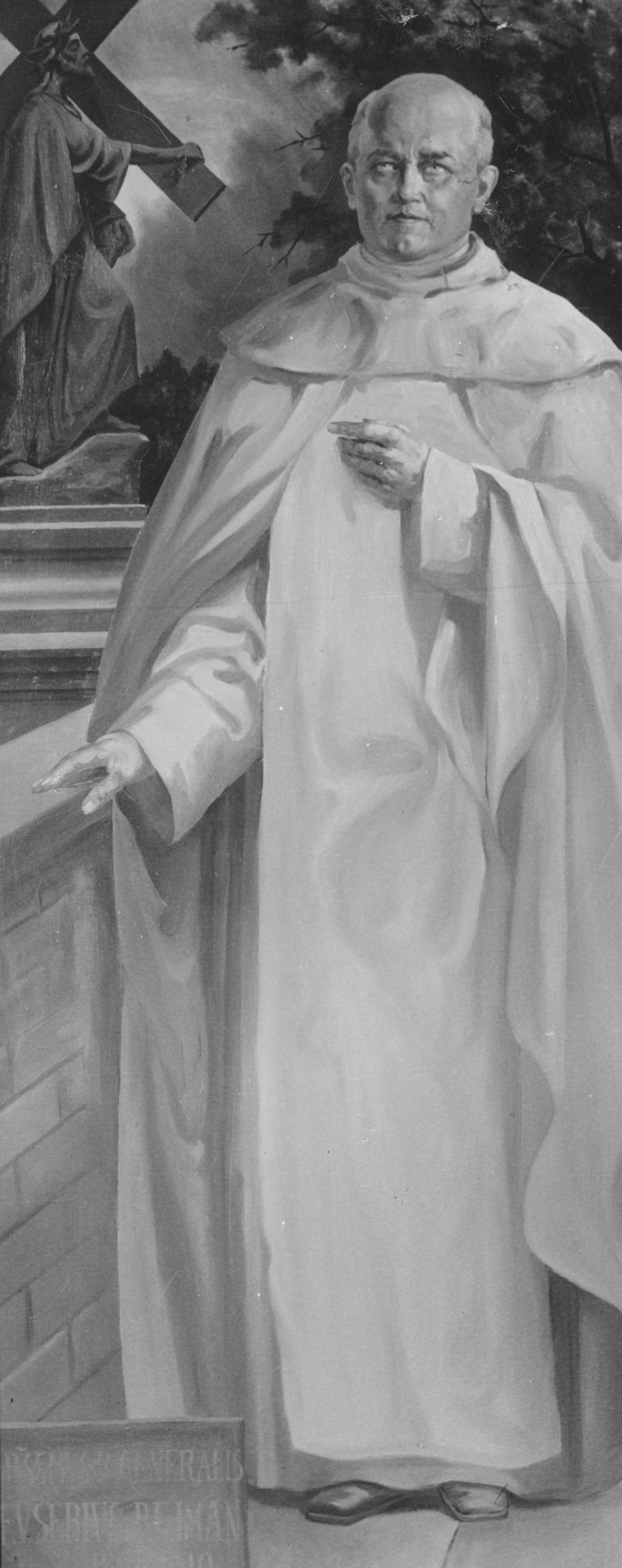 portret generała zakonu paulinów na Jasnej Górze o. Euzebiusza Rejmana. Sygnatura: 1-K-2275